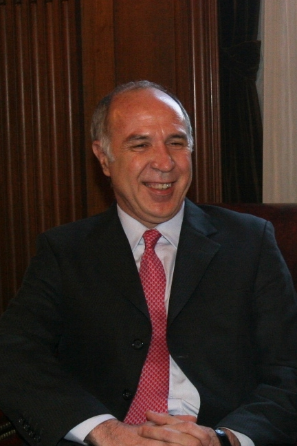 Presidente de la Corte Suprema Ricardo Lorenzetti. Oct'09